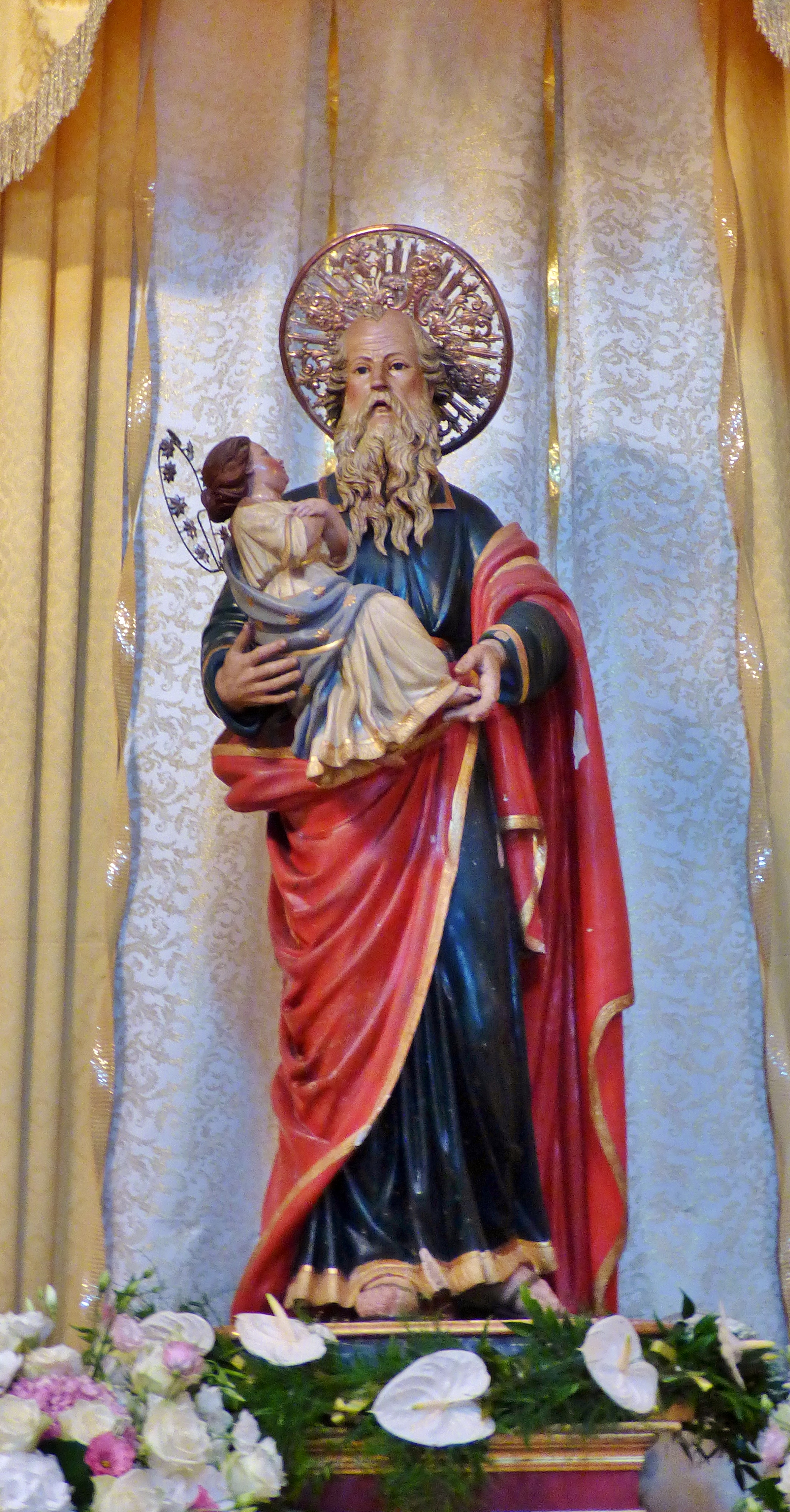 Statua di San Gioacchino con la Vergine Maria in braccio, venerata a Ceglie Messapica, opera dello scultore napoletano Giuseppe Maffia e datata 1868. Conservata nell'omonima chiesa di Ceglie.